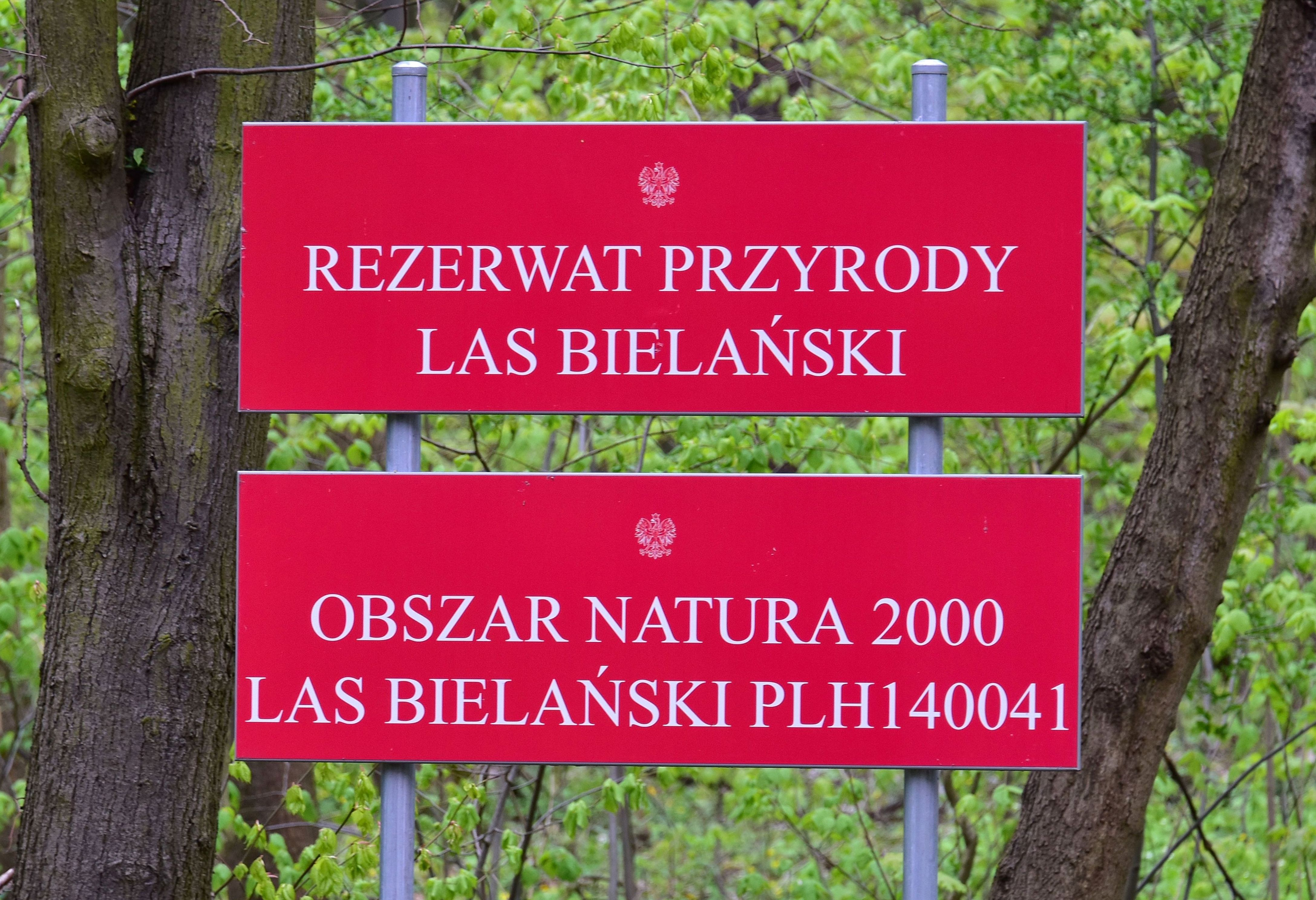 Tablica informacyjna przy ul. Dewajtis w Warszawie